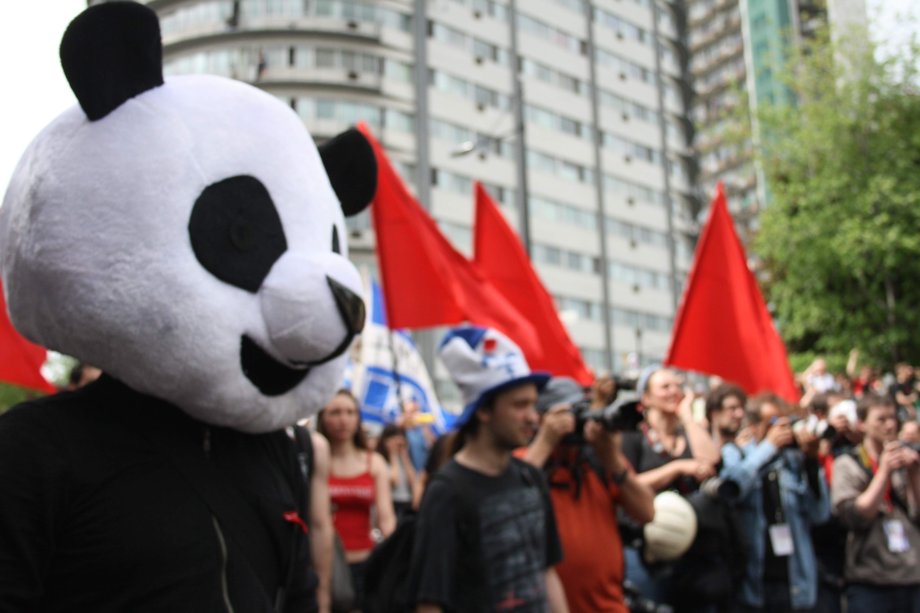 Anarchopanda, une mascotte aperçue régulièrement lors des manifestations de la grève étudiante québécoise de 2012, lors de la manifestation nationale du 22 mai 2012 à Montréal.